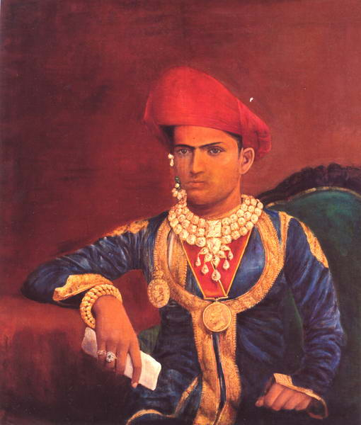 Raja Ravi Varma Painting Maharaja SAYAJIRAO